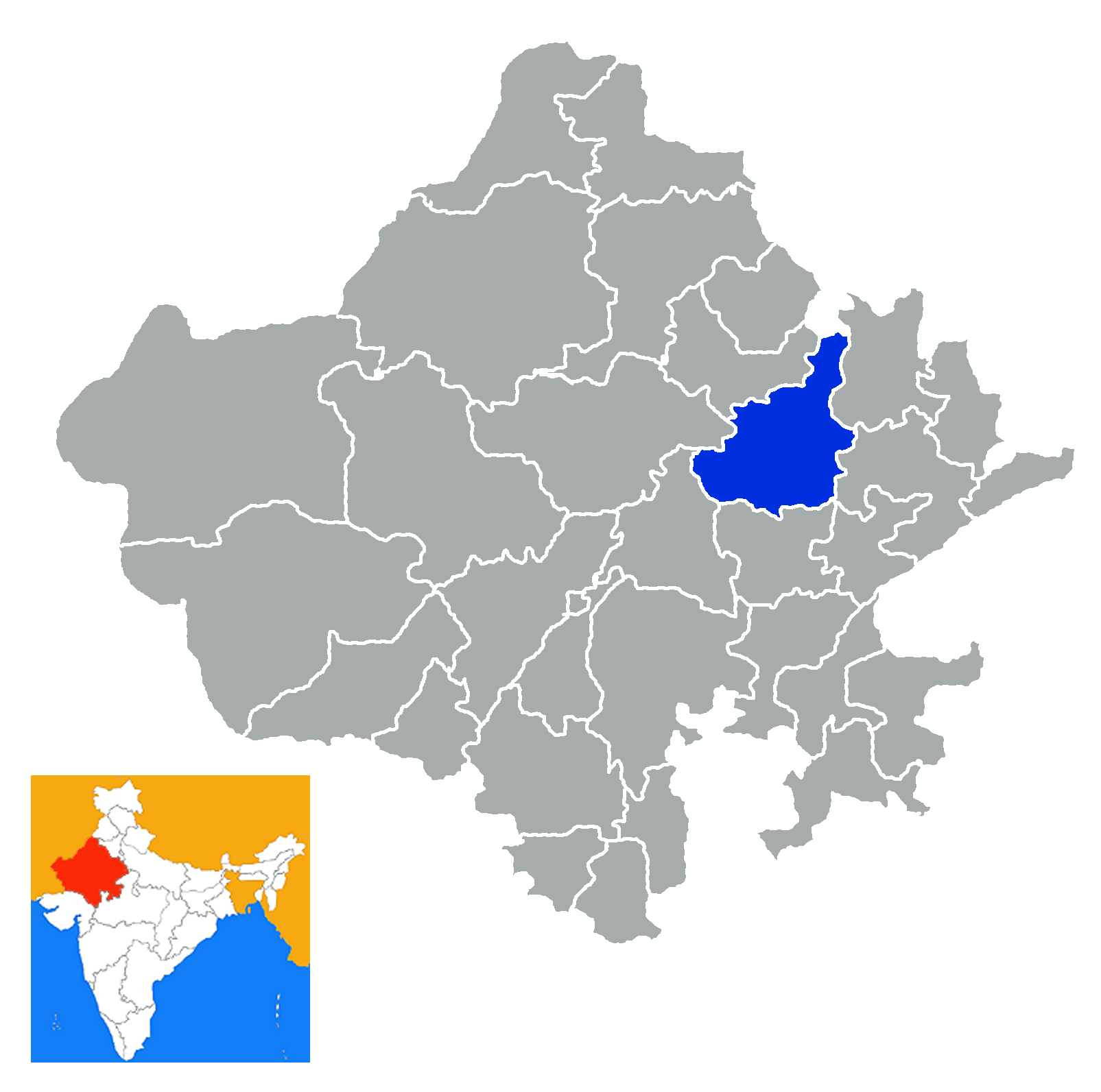 Distrito de Jaipur Rajastan India